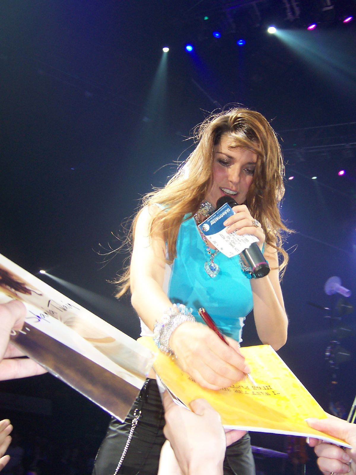 Shania Twain100_8553